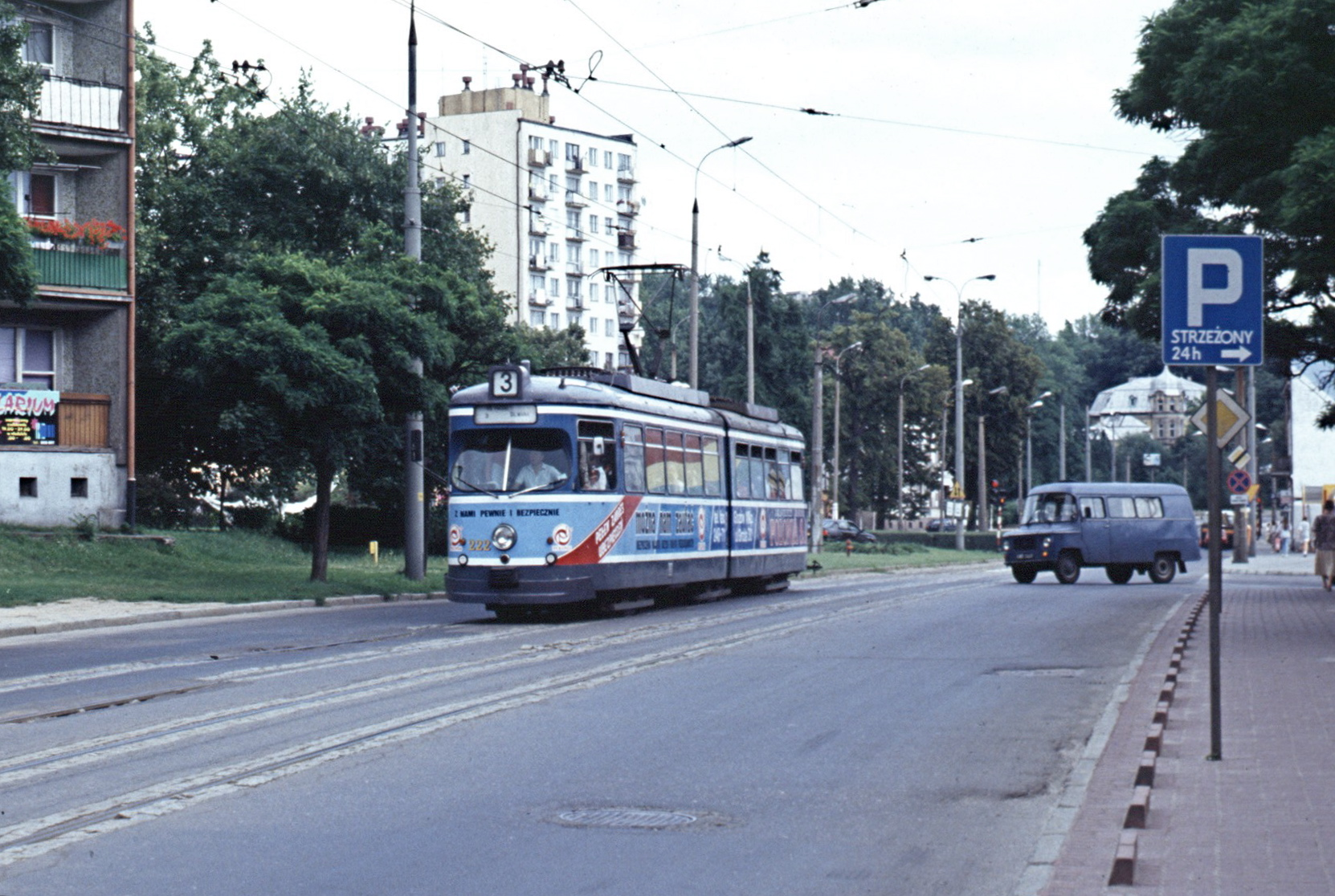 Duewag 6EGTW in Gorzów Wielkopolski